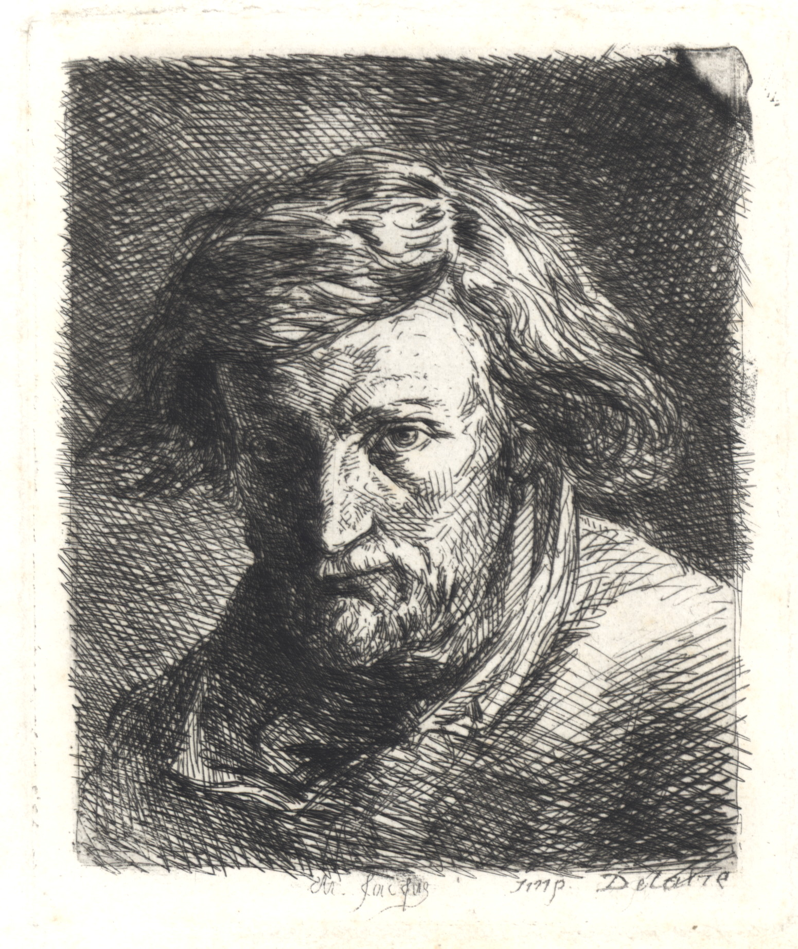 Selbstportrait 1846